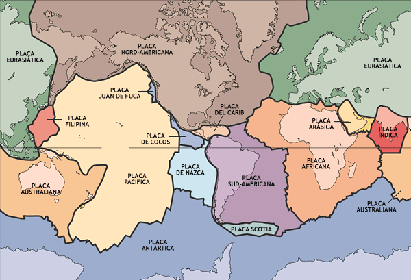 Plaques tectòniques (noms en català)